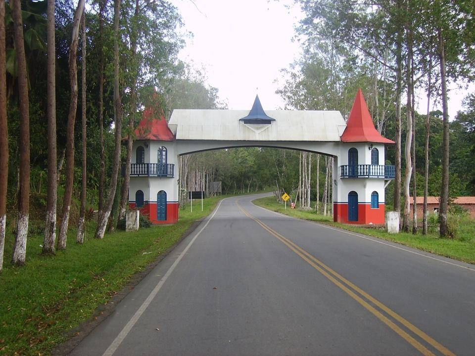 Foto sa entrada da cidade